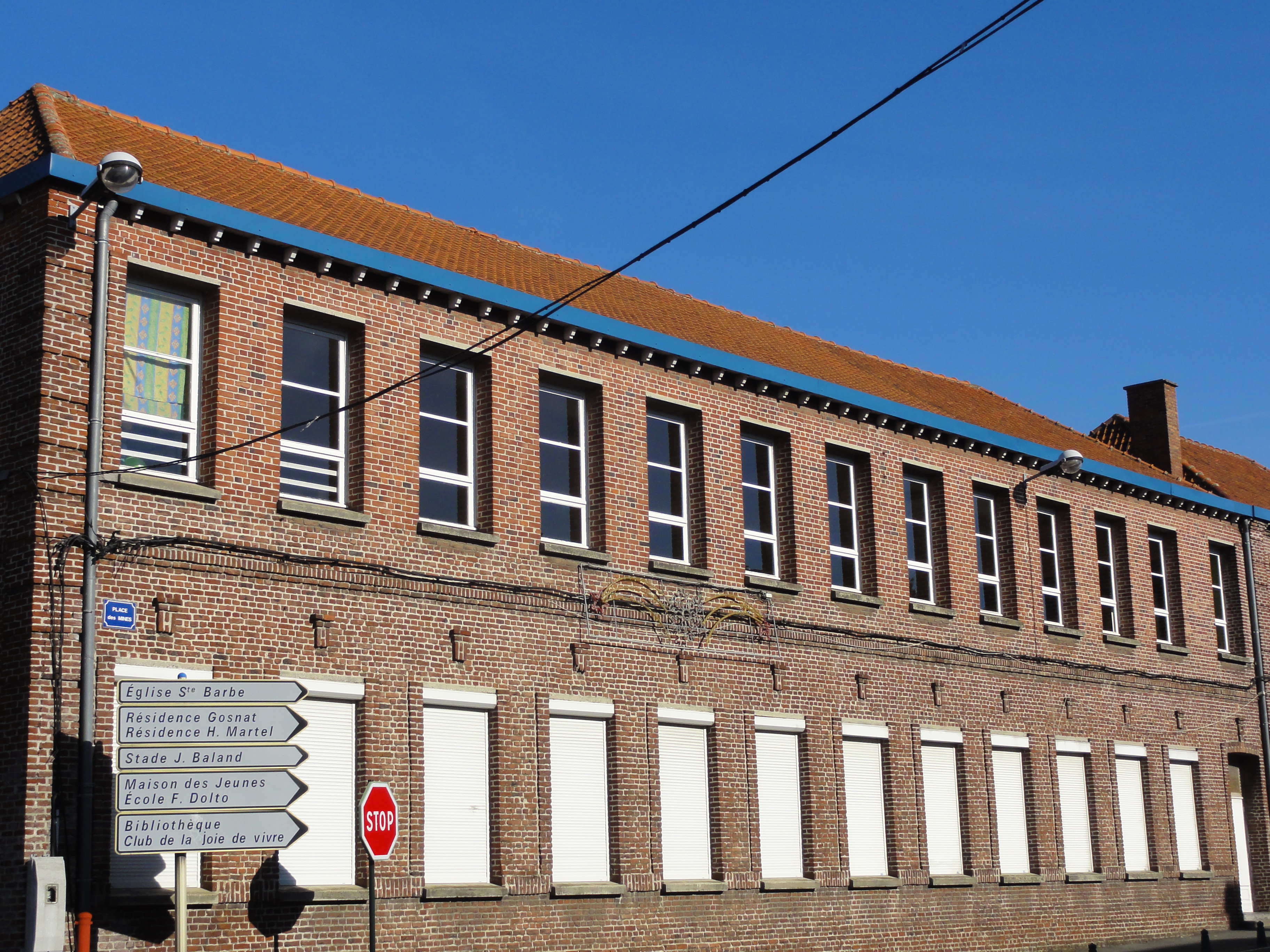 Écoles des cités de la Fosse n° 1 de la Compagnie des mines de Drocourt, Drocourt, Pas-de-Calais, Nord-Pas-de-Calais, France.